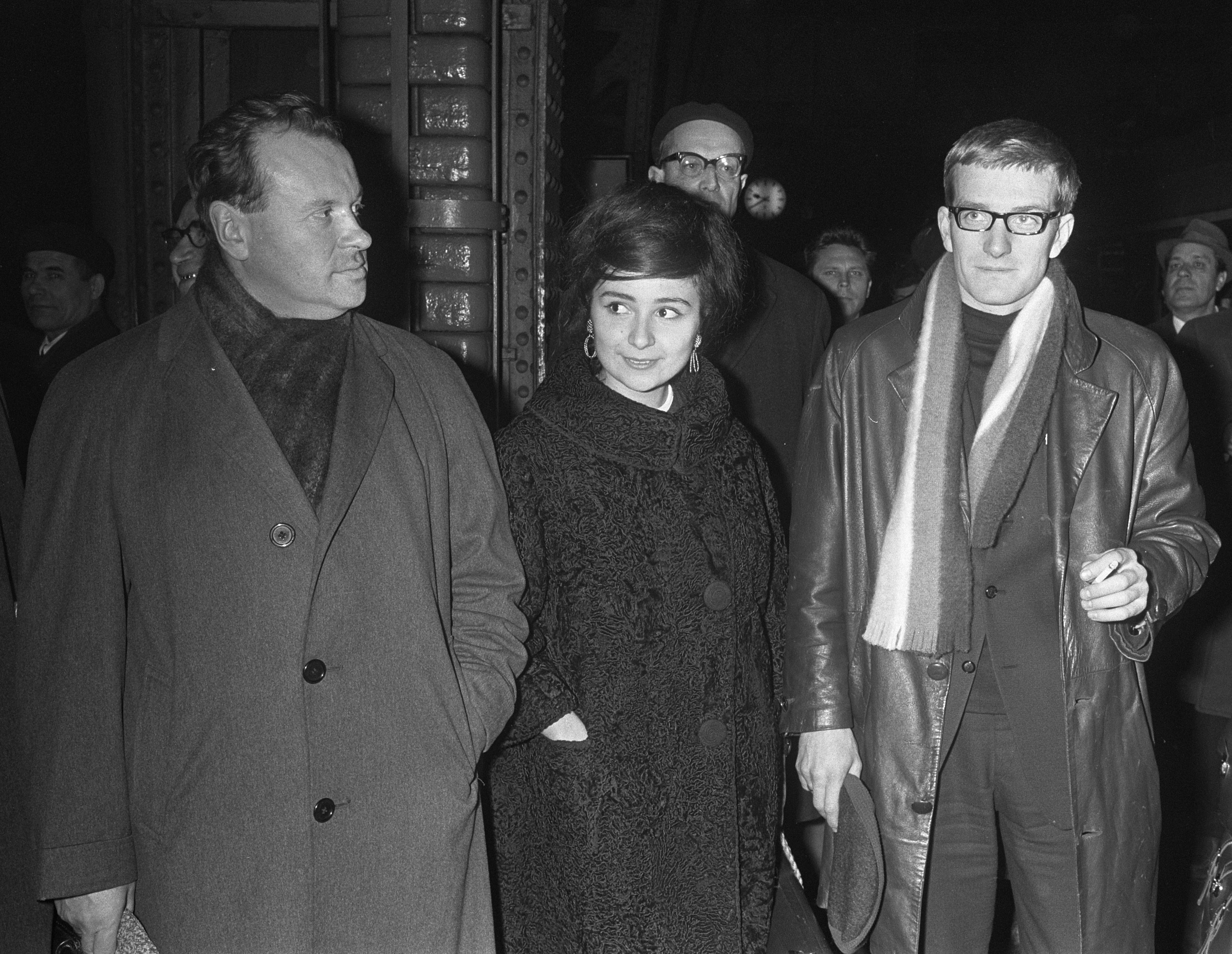 Aankomst Russisch Staatsorkest op CS Amsterdam. Maxim Sjostakowitsj , Liana Isakadze en Jevgennij Svet Lanov